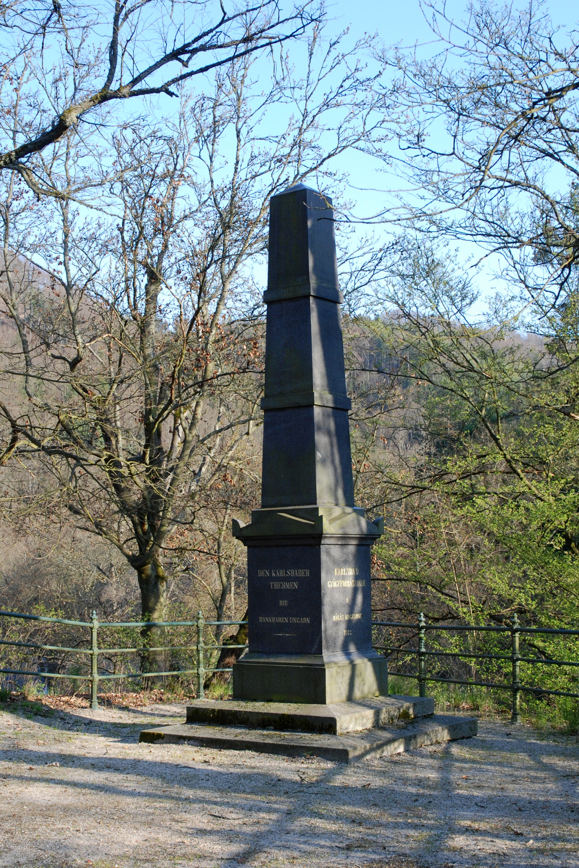 Sloup Vděčných Maďarů u silnice na terase ve svahu pod hotelem Imperial v Karlových Varech